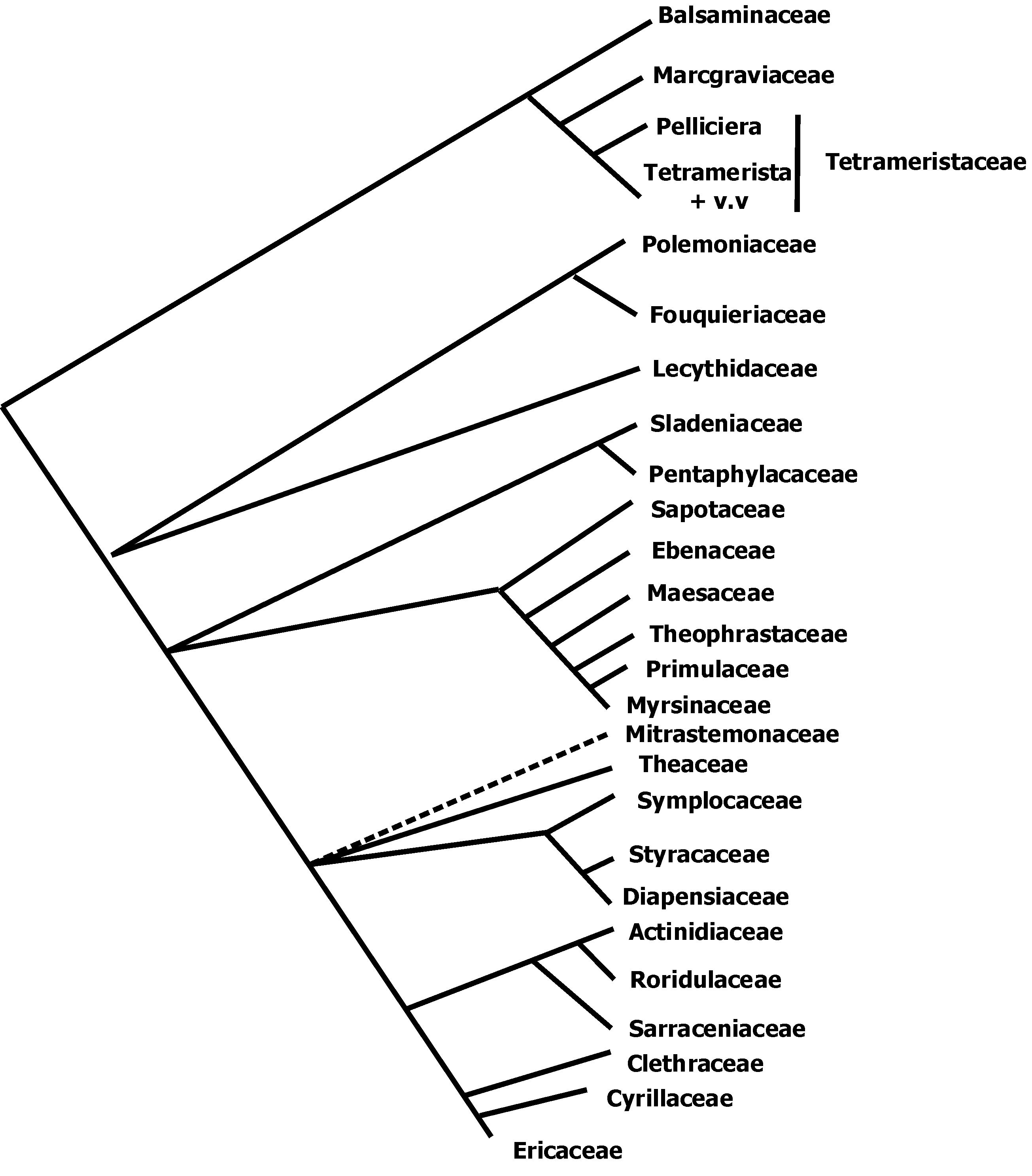 Tự vẽ lại theo APG. Sử dụng tự do.